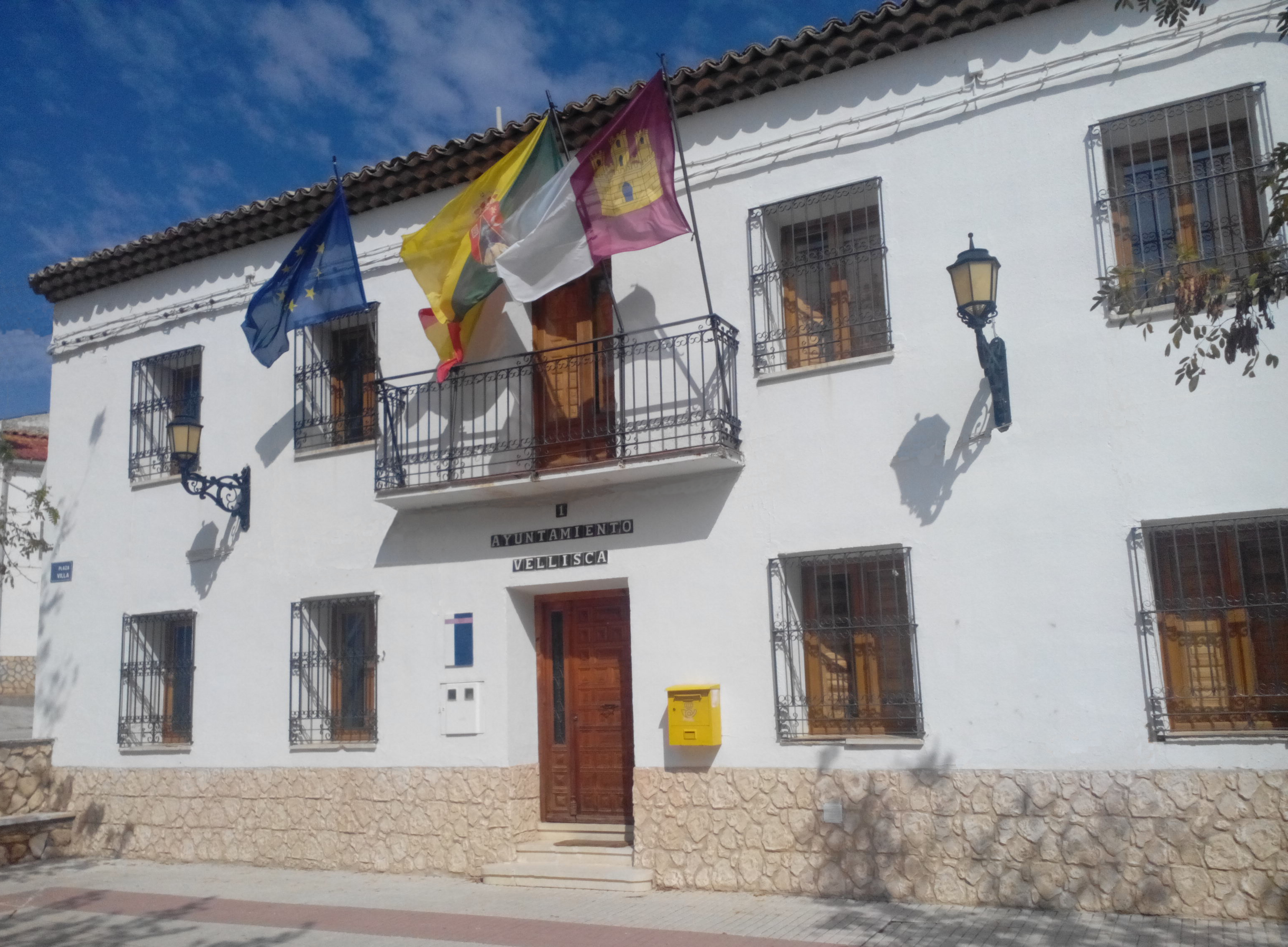 Ayuntamiento de Vellisca (Provincia de Cuenca - España).